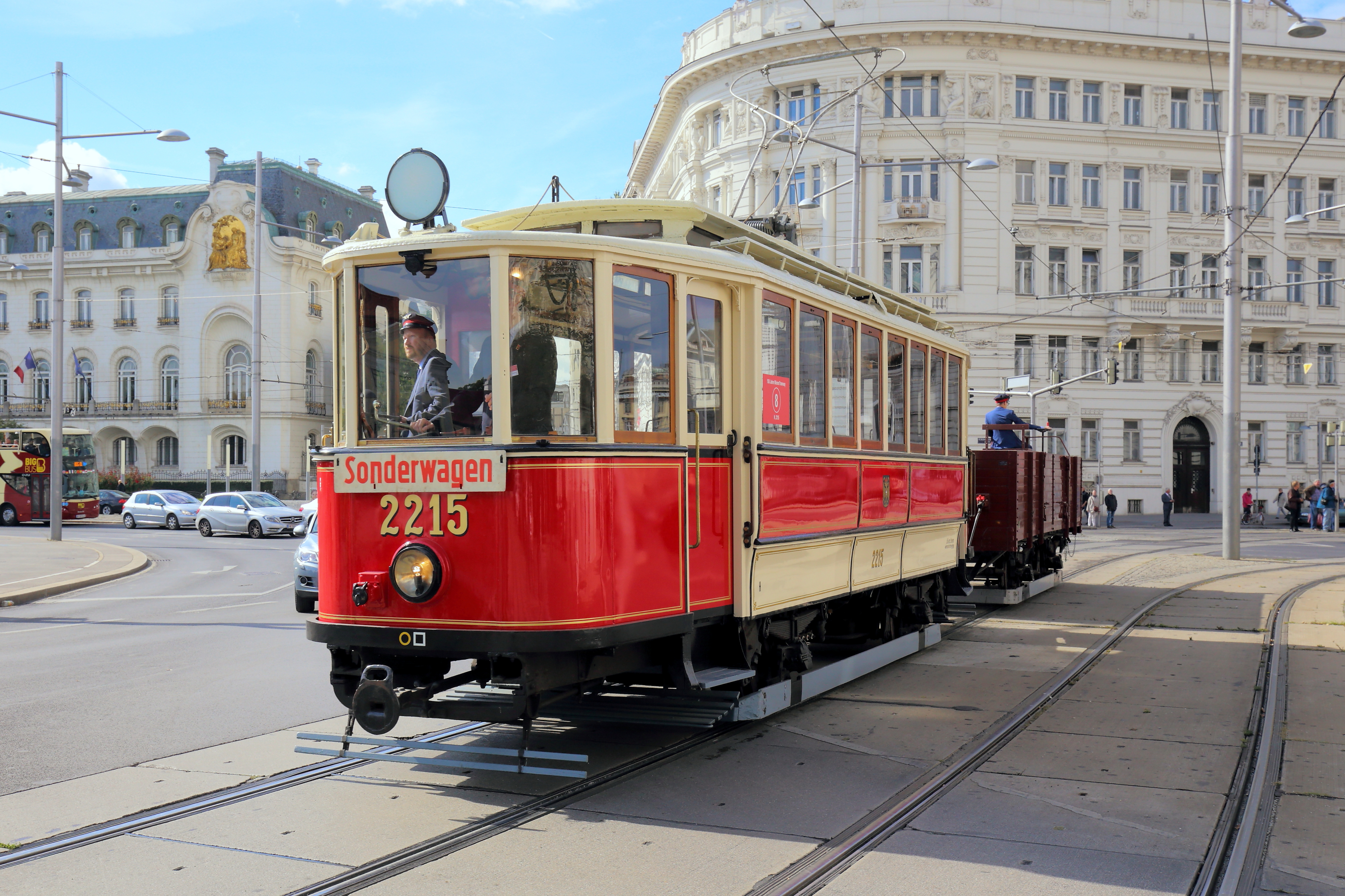 Der im Jahr 1910 von der Maschinen- und Waggonbau-Fabriks-Aktiengesellschaft in Simmering, vormals H. D. Schmid gefertigte und 1928 von den Lohnerwerke Wien umgebaute Triebwagen Type H Nummer 2215 mit einem Güter- und Materiallastwagen Type gm Nr. 7059, ebenfalls in Simmering 1916 gefertigt. Der Triebwagen wurde bei der Wiener Straßenbahn eingesetzt und war der erste Triebwagentyp mit geschlossenen Plattformen. Er hat eine Länge über Puffer von 10650 mm, einen Achsstand von 3600 mm, ein Eigengewicht von 10600 kg, eine Leistung von 76 kW und hat 22 Sitzplätze sowie 39 Stehplätze. Der Triebwagen ist hier im Zuge der Veranstaltung "150 Jahre Wiener Tramway" nächst Schwarzenbergplatz in Wien auf Schiene.